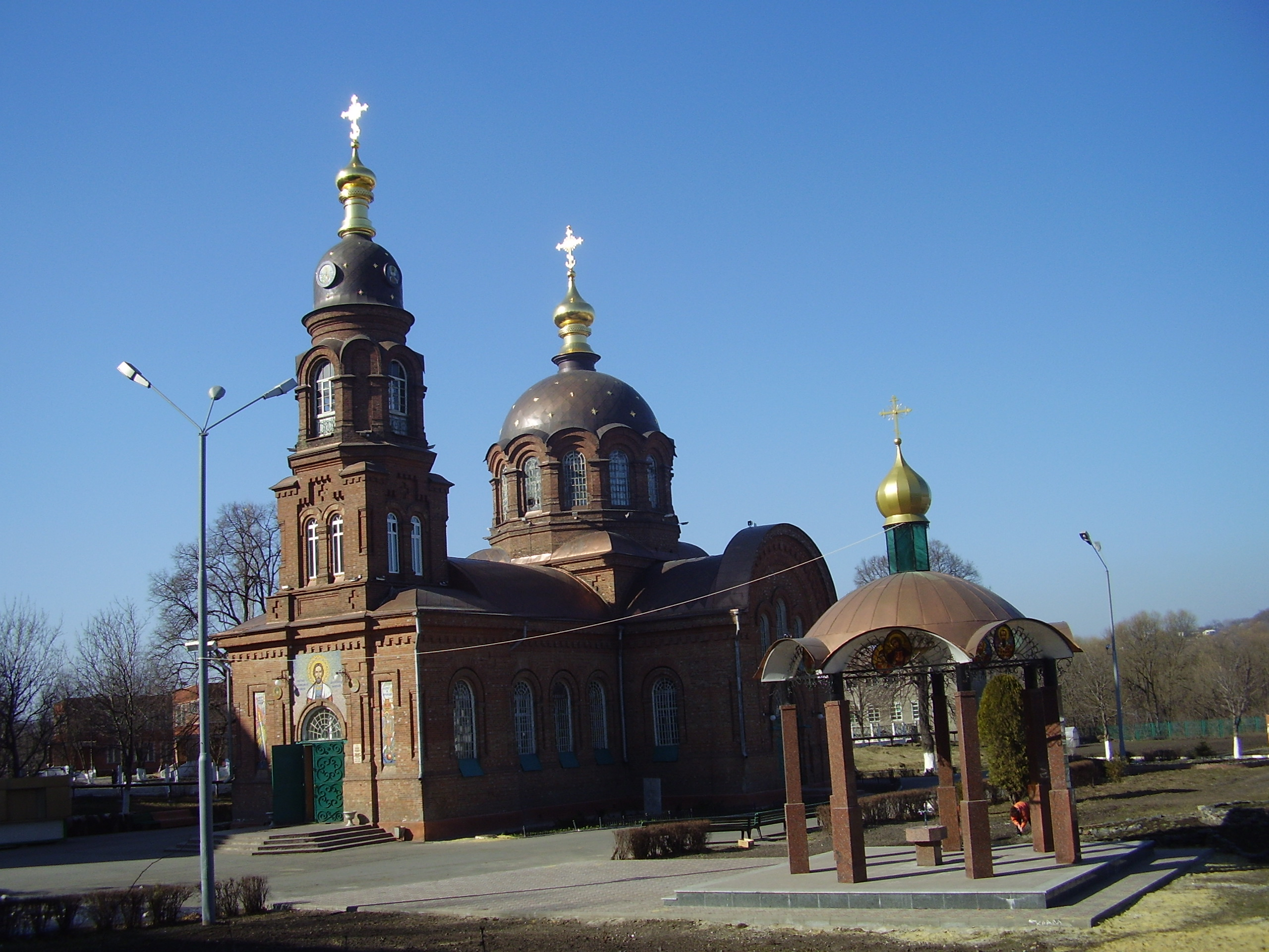 Александро-Невский собор в Старом Осколе